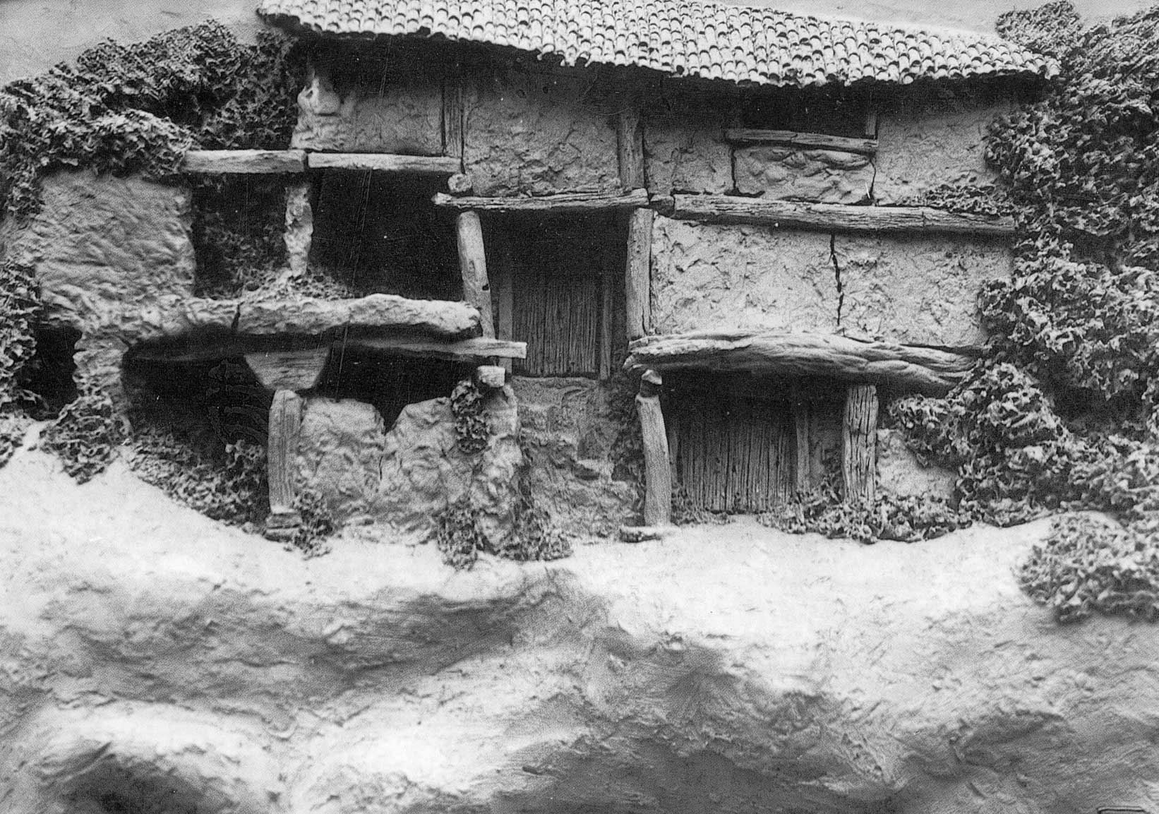 Altorrelieve realizado en arcilla cocida a 1000ºC. Textura de arquitectura popular 28